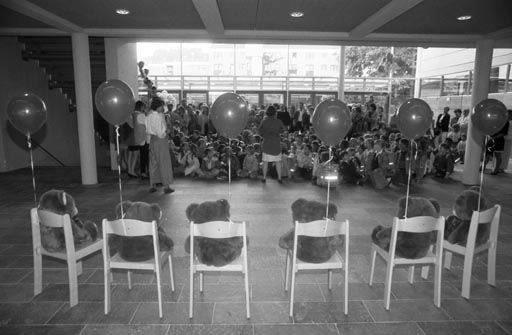 Erster Schultag. Veröffentlicht in Süddeutsche Zeitung, Nr. 25, 31. Januar/1. Februar 1998, SZ am Wochenende, S. VI